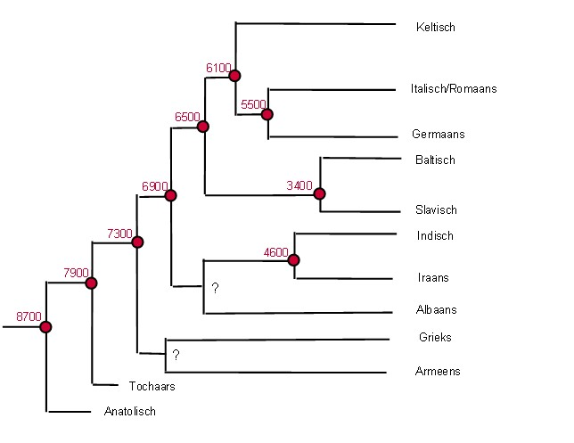 indo europese stamboom eigen maaksel